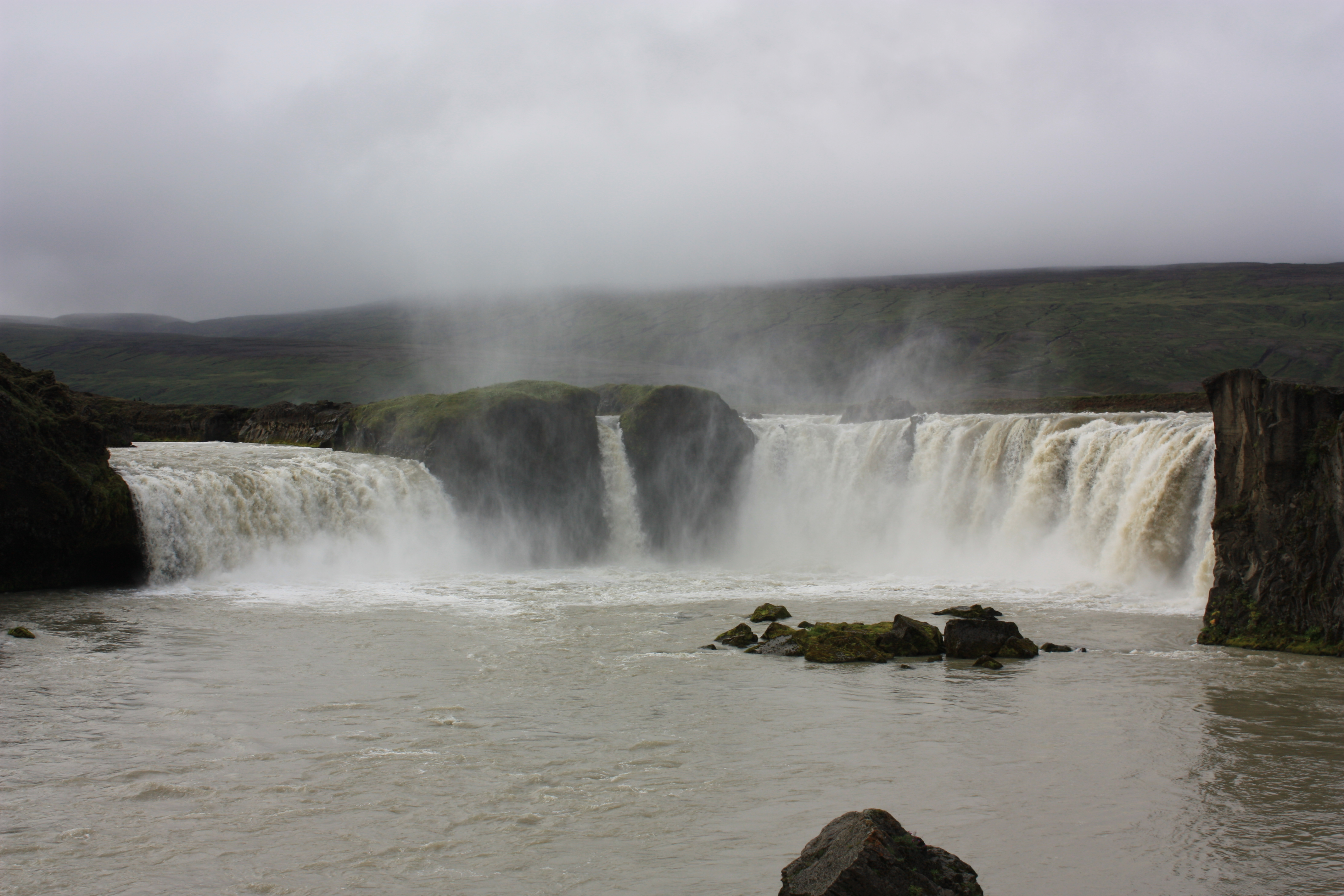 Goðafoss